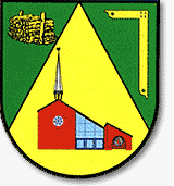 Coat of arms Horstedt (Niedersachsen), Wappen der Gemeinde Horstedt